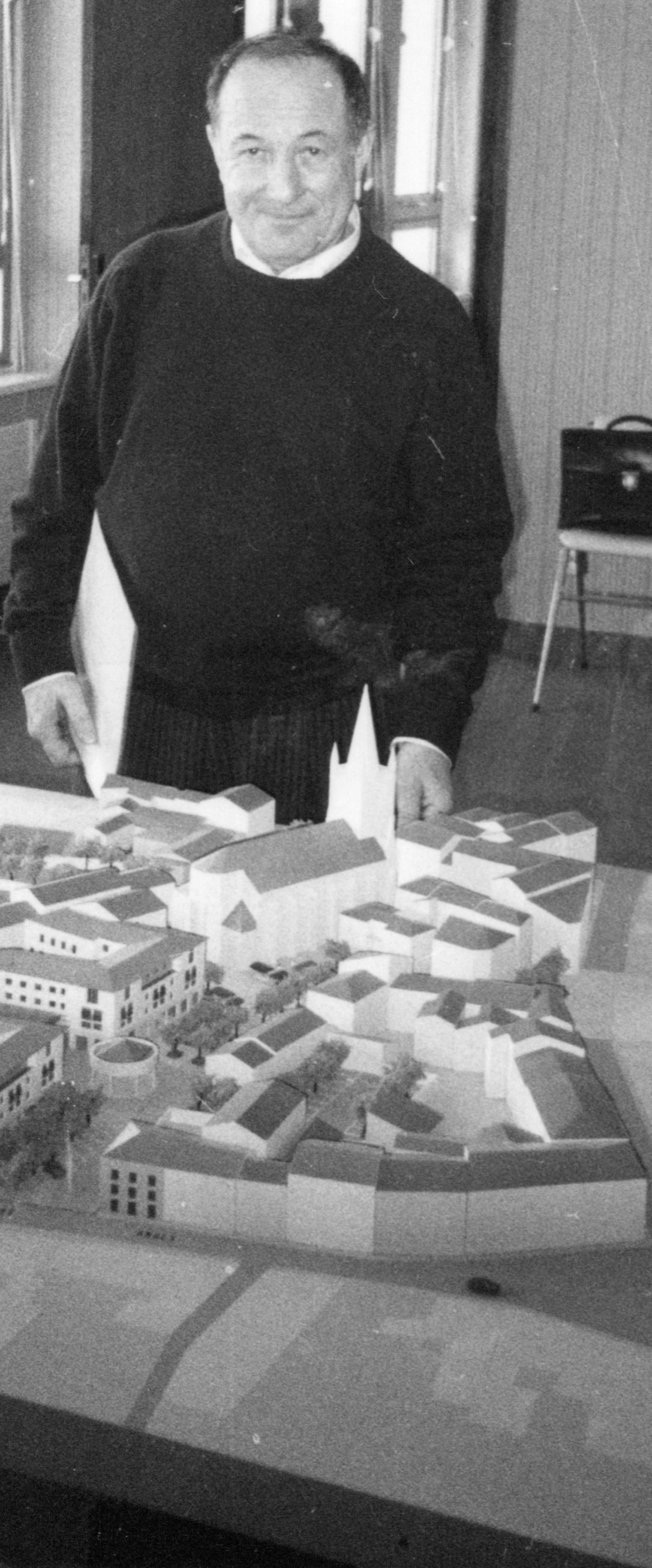 JEAN SALQUE MAIRE DE SAINTE SIGOLENE DE 1965 A 1989